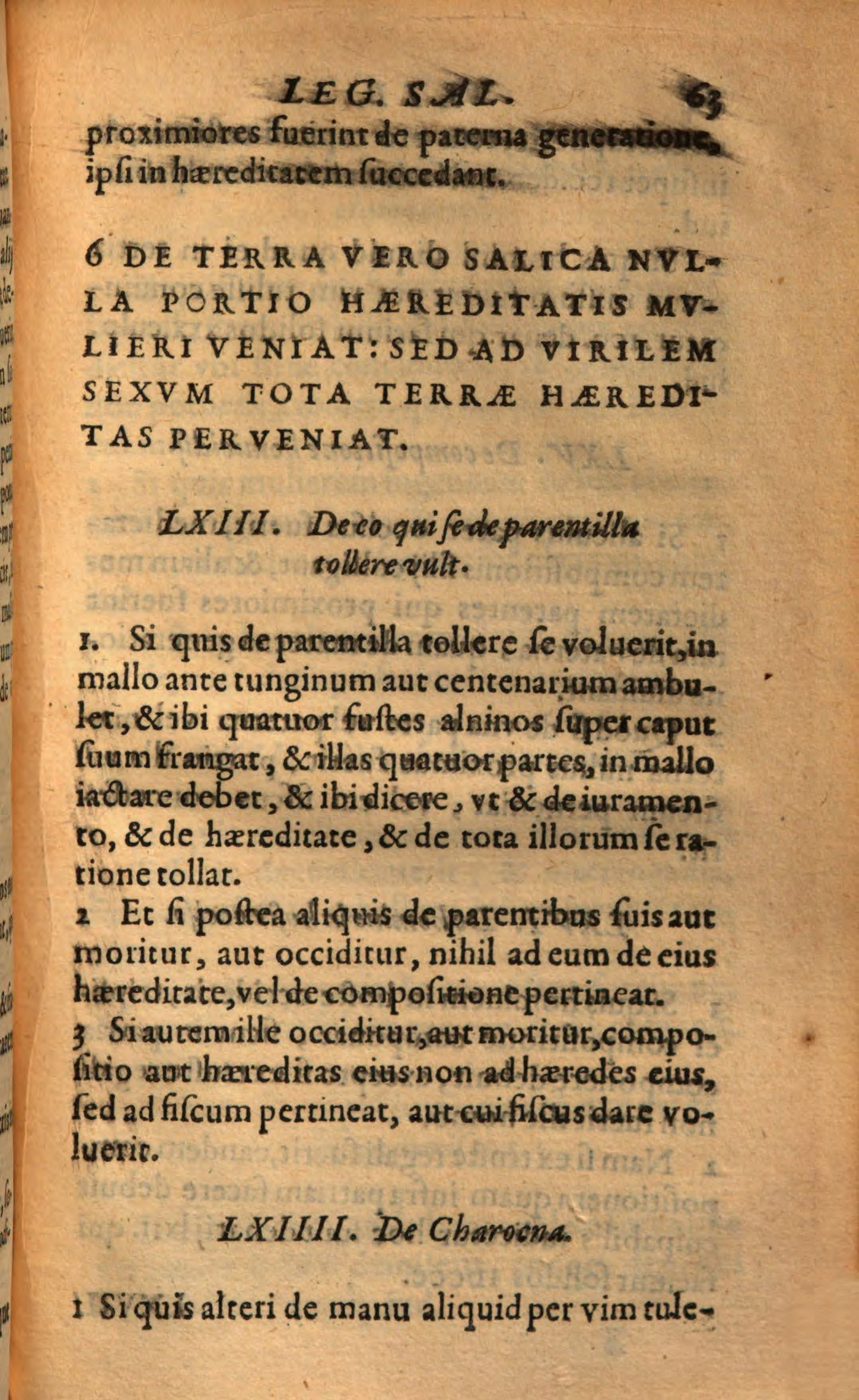 Liber legis Salicae : glossarium sive interpretatio rerum et verborum obscuriorum quae in ea lege habentur